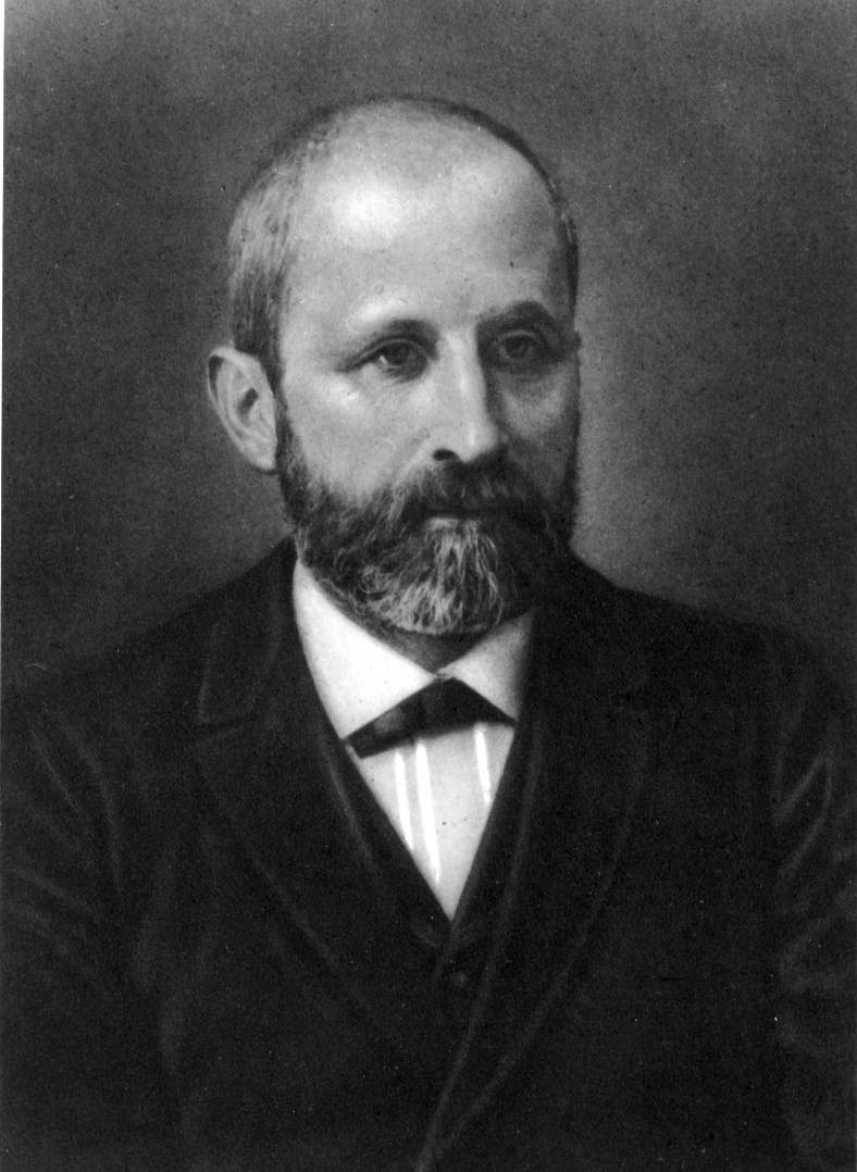 Friedrich Miescher (scientist)